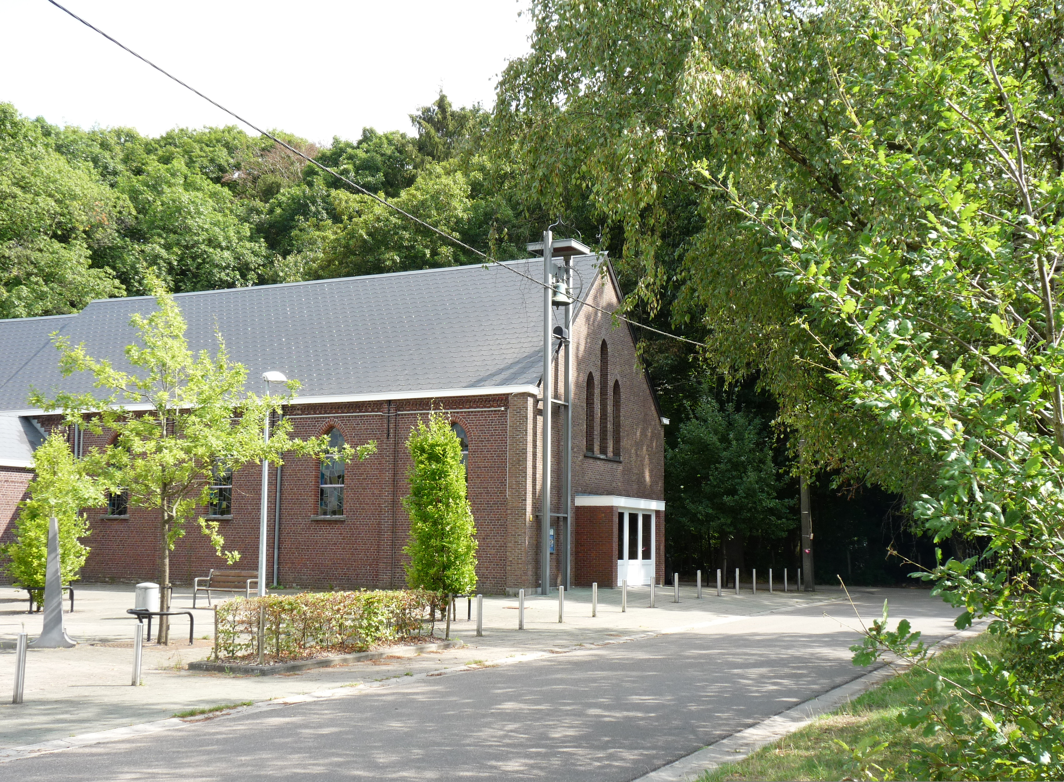 Parochiekerk H. Hart en H. Antonius van Padua, Okselaar (Scherpenheuvel-Zichem, België)